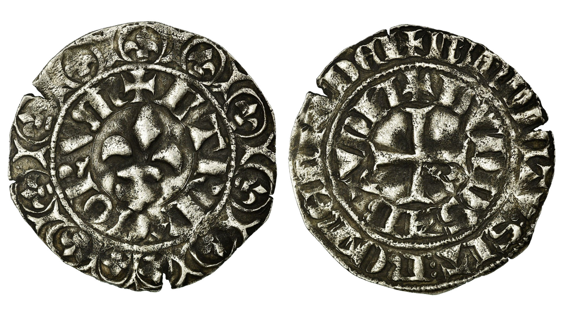 Avers : Fleur de Lys, Bordure de 11 Lis Revers : Croix avec 1/2 fleur de lis au second canton + L' TRNCORVM + LVD D SABAVDI + BENDICTVM : SIT : NOMEN : DEI Ce type imite les gros à la fleur de Lys de Philippe VI De Valois